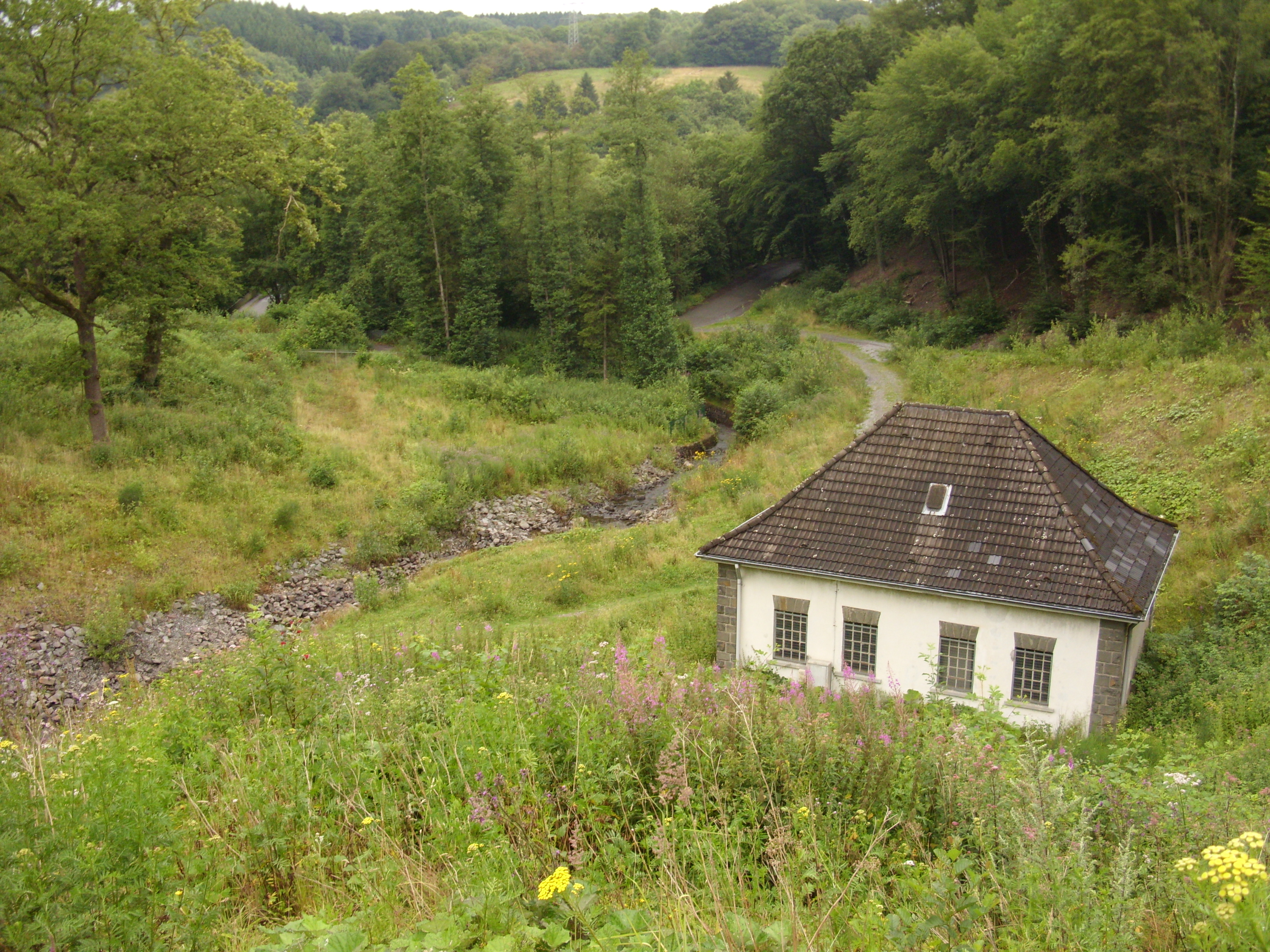 Pumpenhaus der ehemaligen Unteren Herbringhauser Talsperre, Wuppertal, Nordrhein-Westfalen